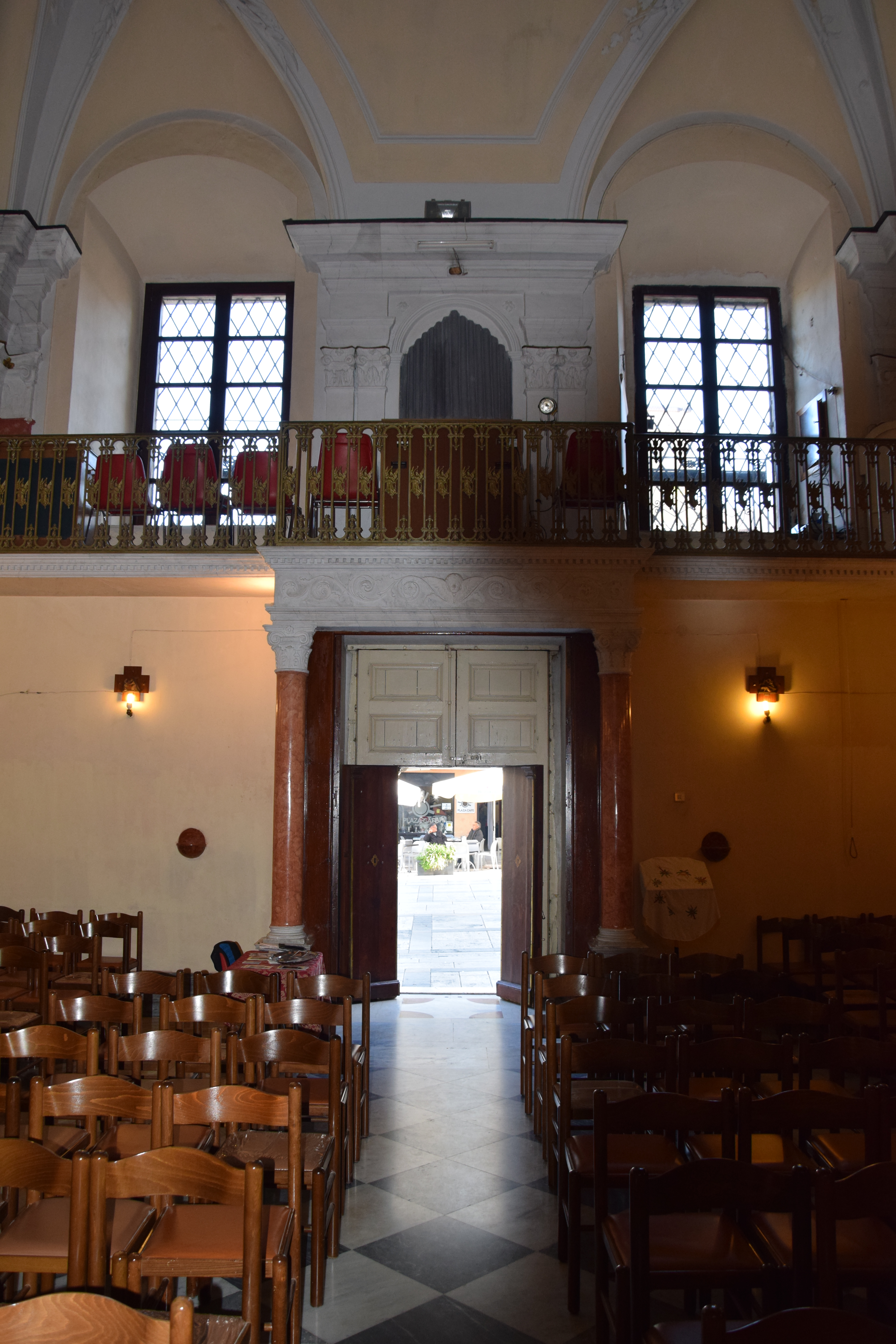 Chiesa della Sacra Famiglia (Alcamo)